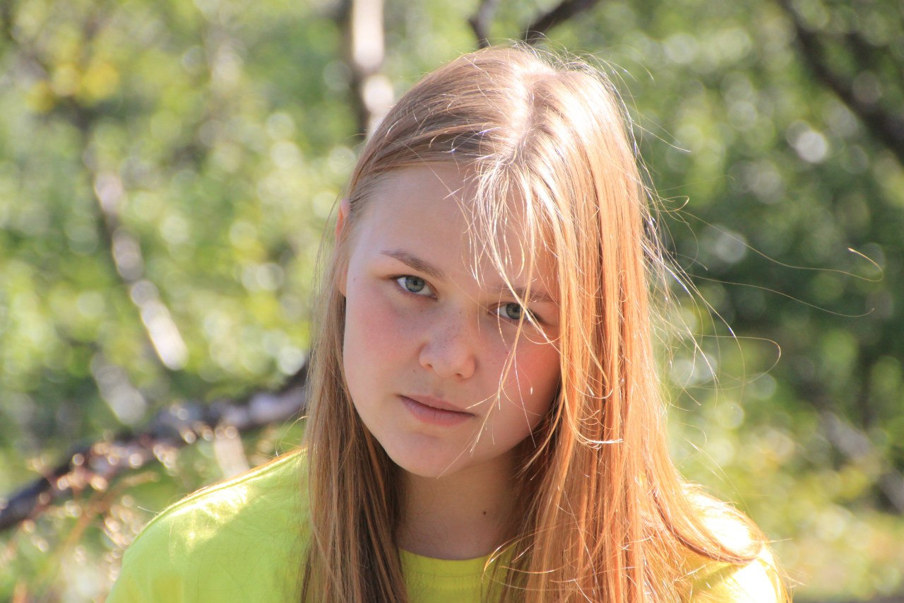 Русская девушка с русыми волосами